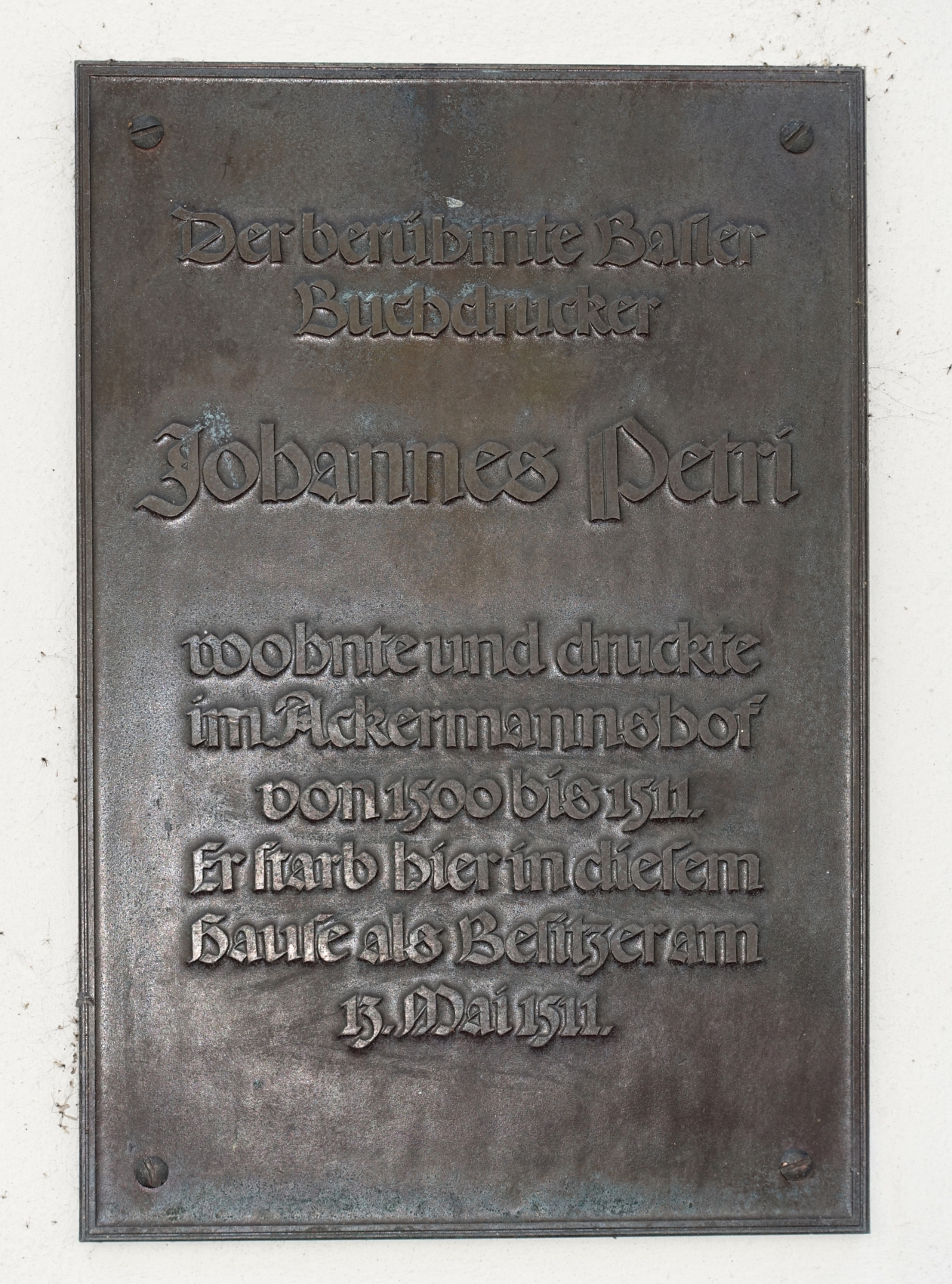 Gedenktafel, Geburtshaus von Johannes Petri (1441-1511) an der St. Johanns-Vorstadt 19-21 in Basel